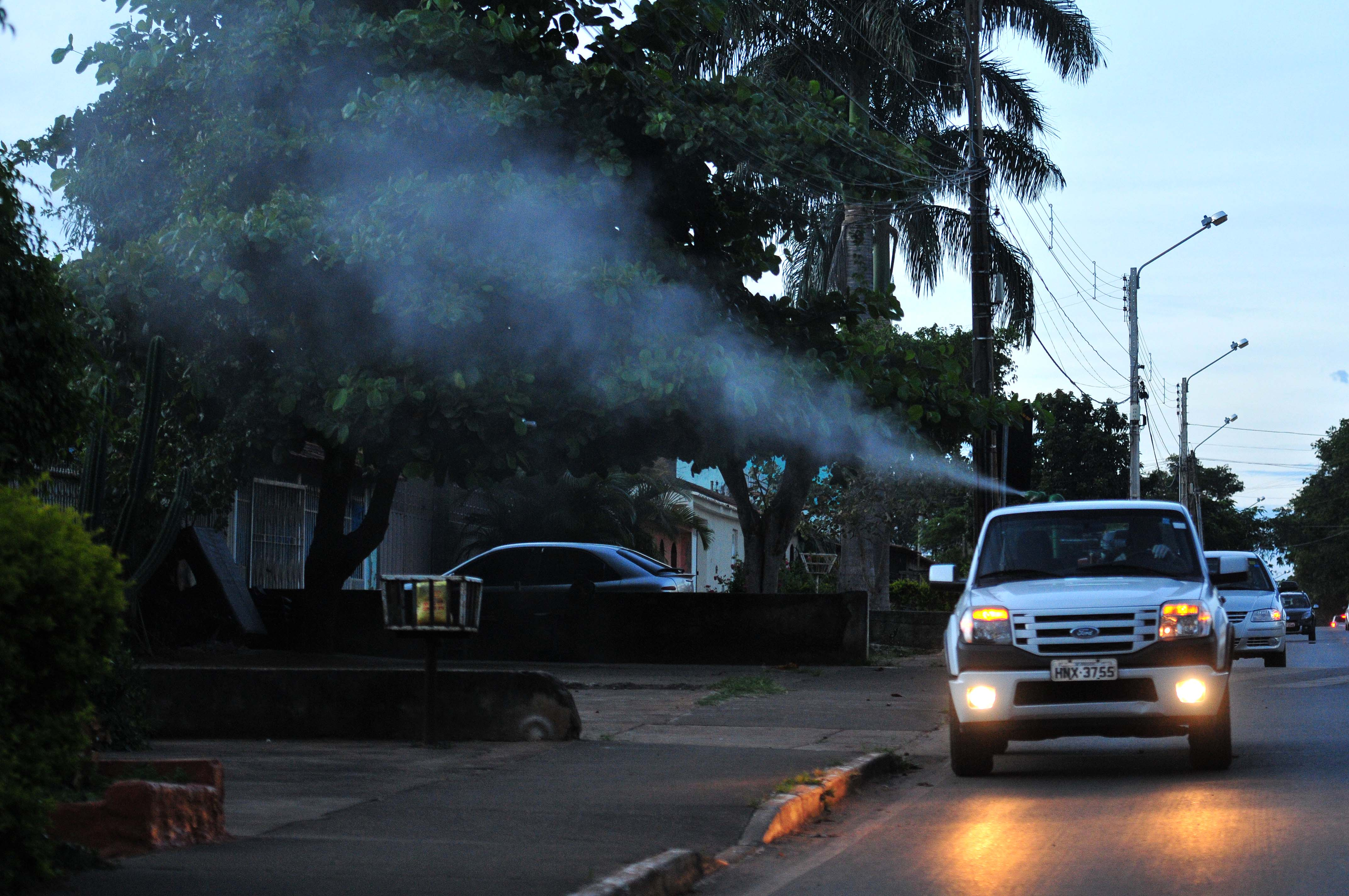 Brazlândia, Brasília, DF, Brasil 24/2/2016 Foto: Renato Araújo/Agência Brasília O governo de Brasília tem reforçado ações para erradicar o Aedes aegypti — mosquito transmissor da dengue, do zika vírus e da febre chikungunya. Nesta quarta-feira (24), cinco fumacês aplicaram inseticida em toda Brazlândia. A região administrativa é a que mais registrou casos de dengue, segundo o último informativo epidemiológico, divulgado pela Secretaria de Saúde em 17 de fevereiro. Leia a matéria no site da Agência Brasília: bit.ly/20VZnnI Fumigation in Brazlândia